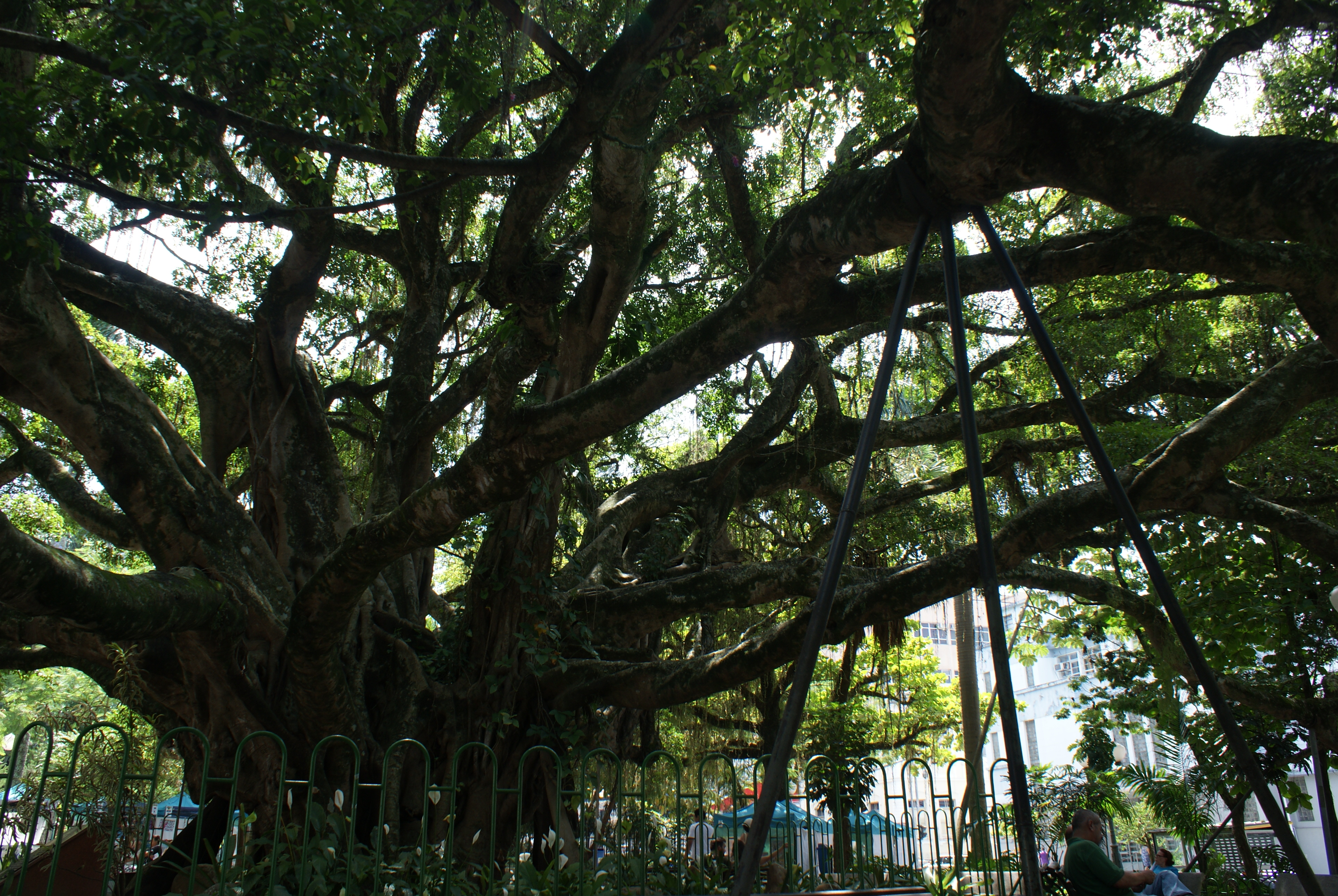 A Figueira da Praça XV de Novembro, ponto turístico de Florianópolis, Brasil.